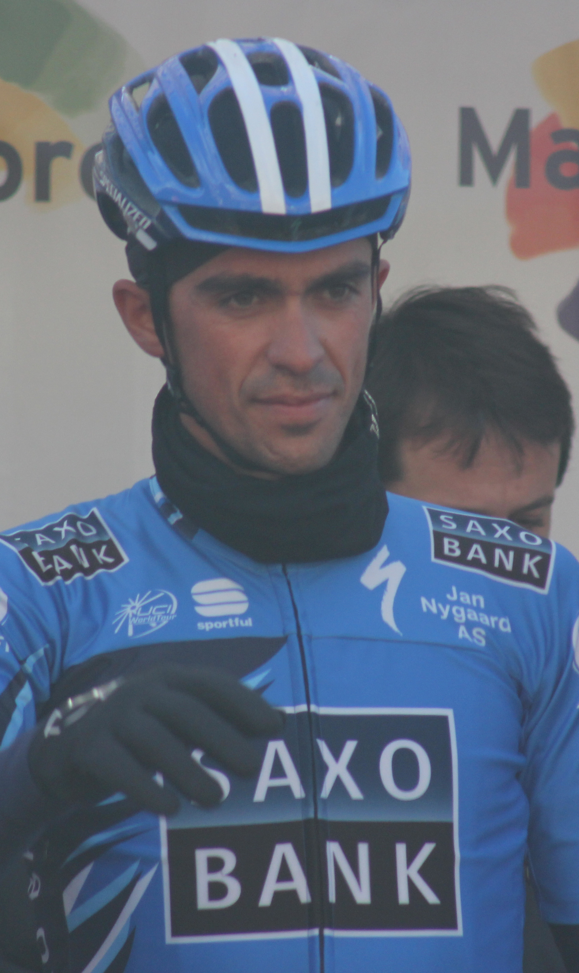 Le Trofeo Palma du Challenge de Majorque (Challenge Vuelta a Mallorca)